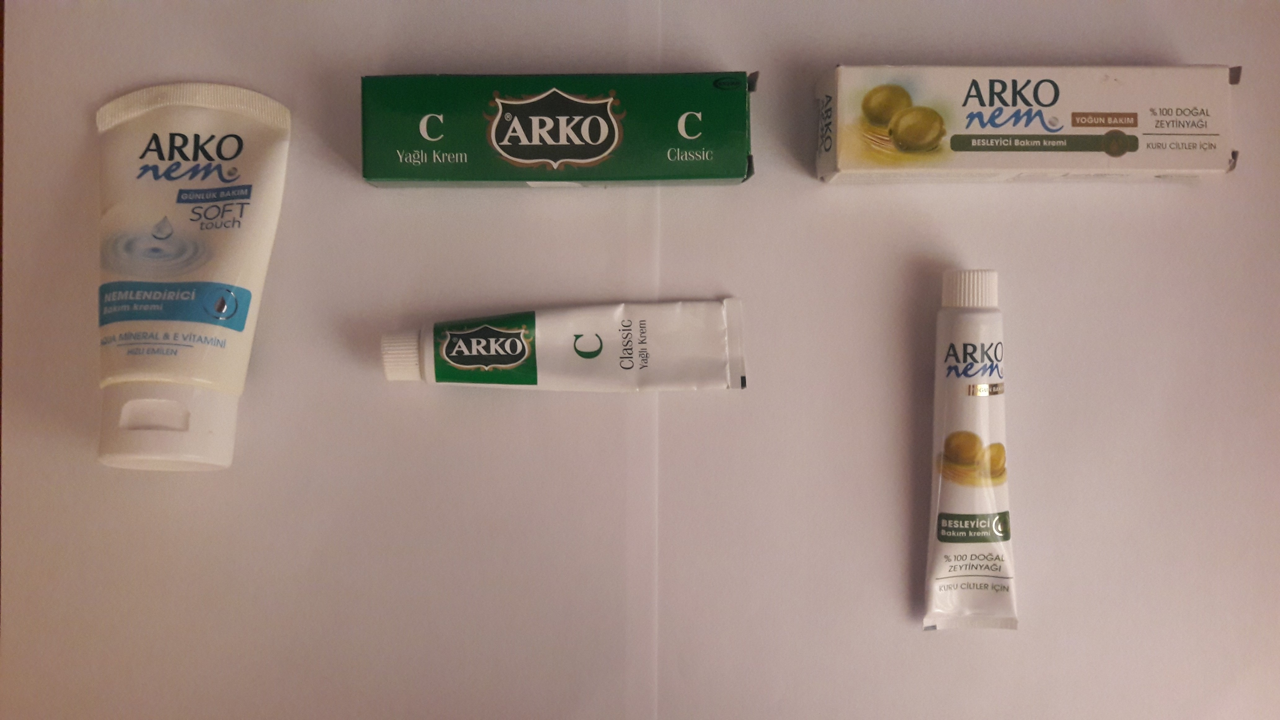 diğer_sürümler